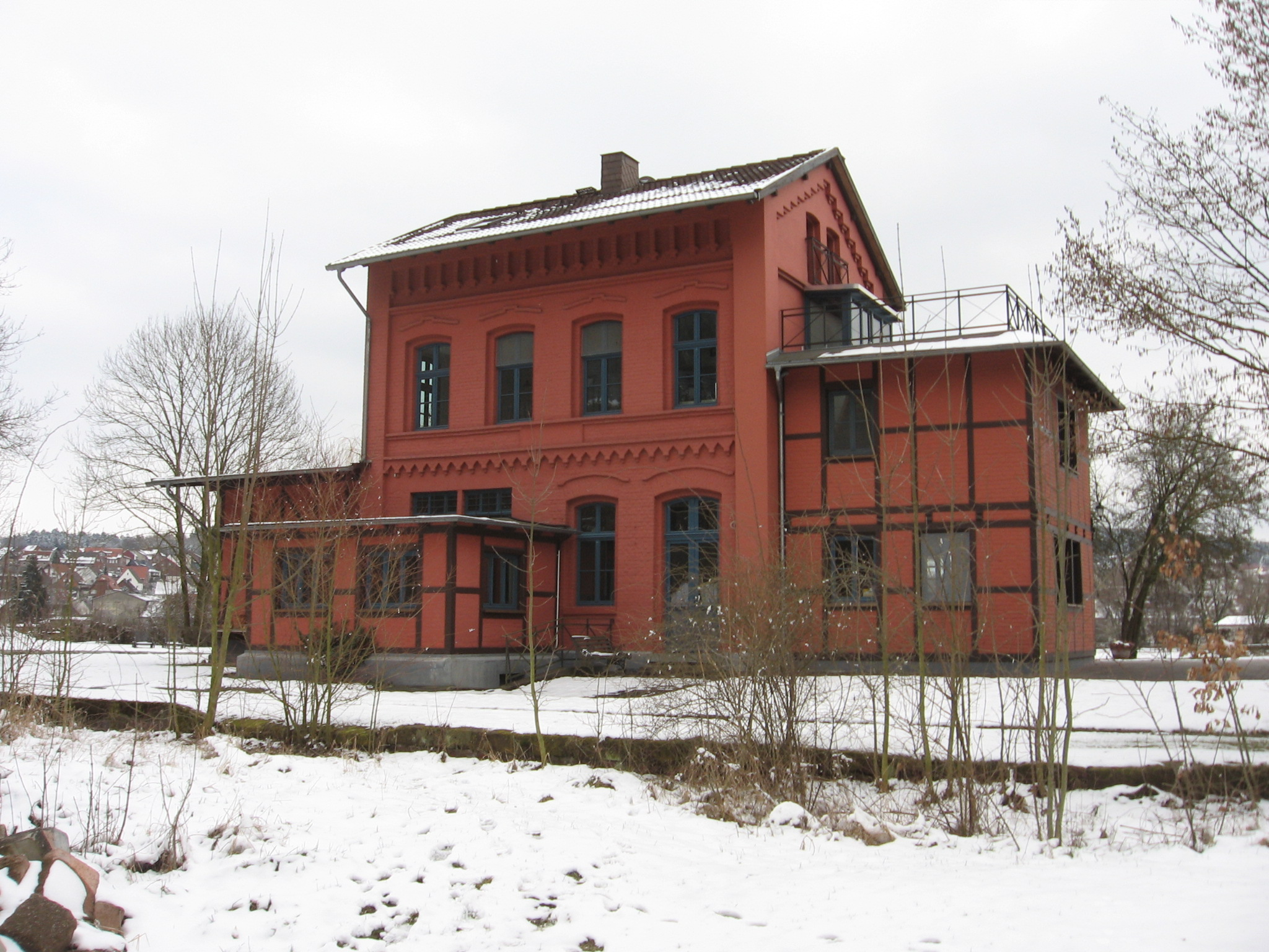 Ehemalige Bahnhof der Almetalbahn in Brenken